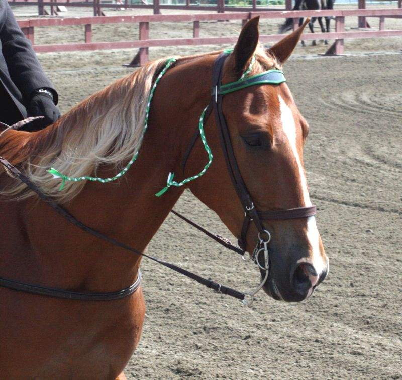 Tennessee Walking Horse